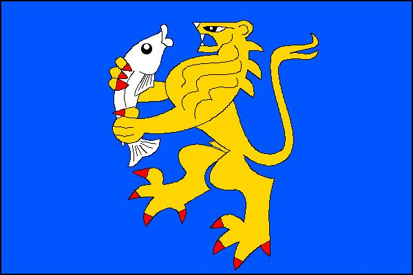 Vlajka obce Charvatce (okres Mladá Boleslav)